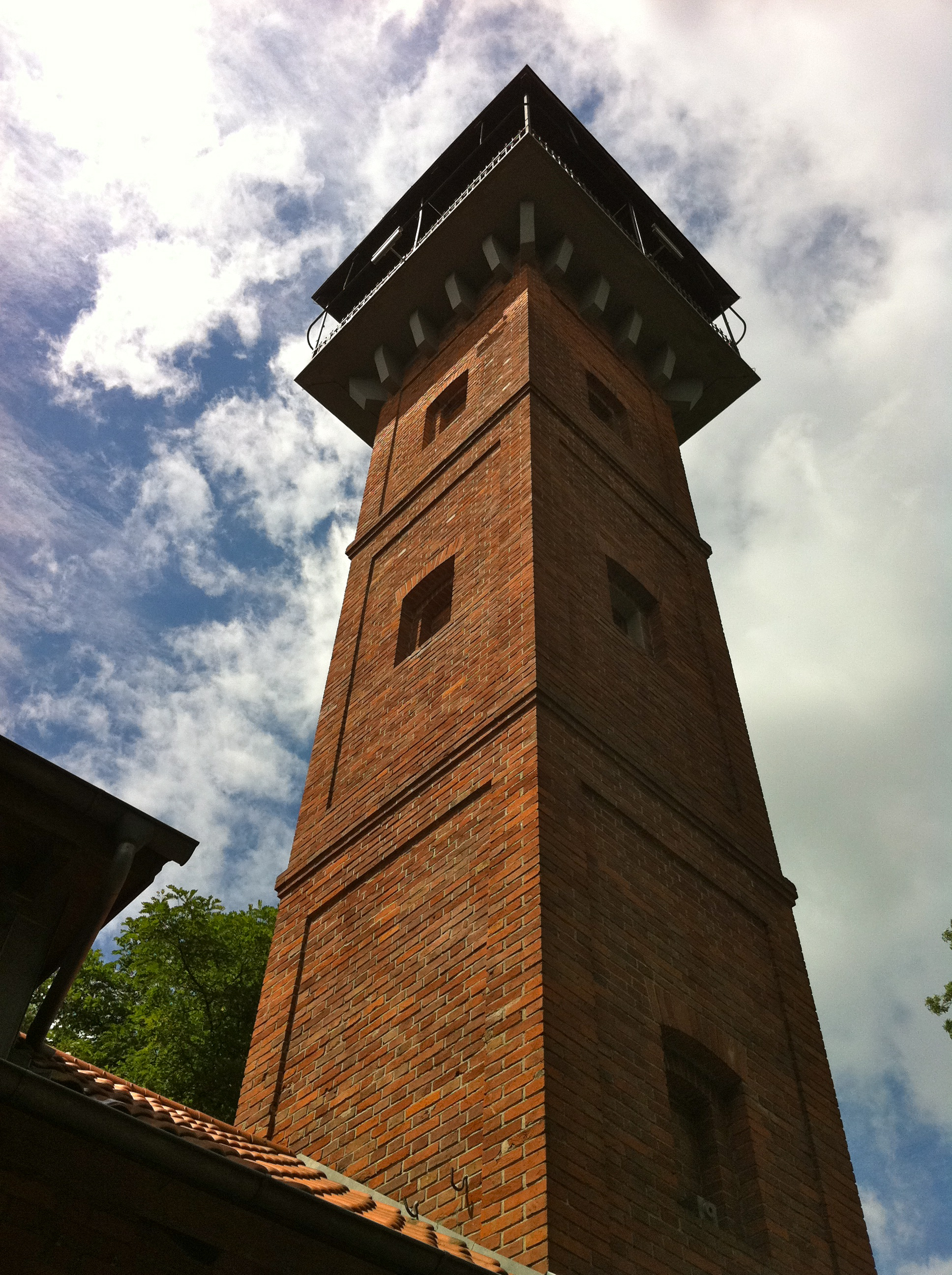 Regenstauf Beobachtungsturm